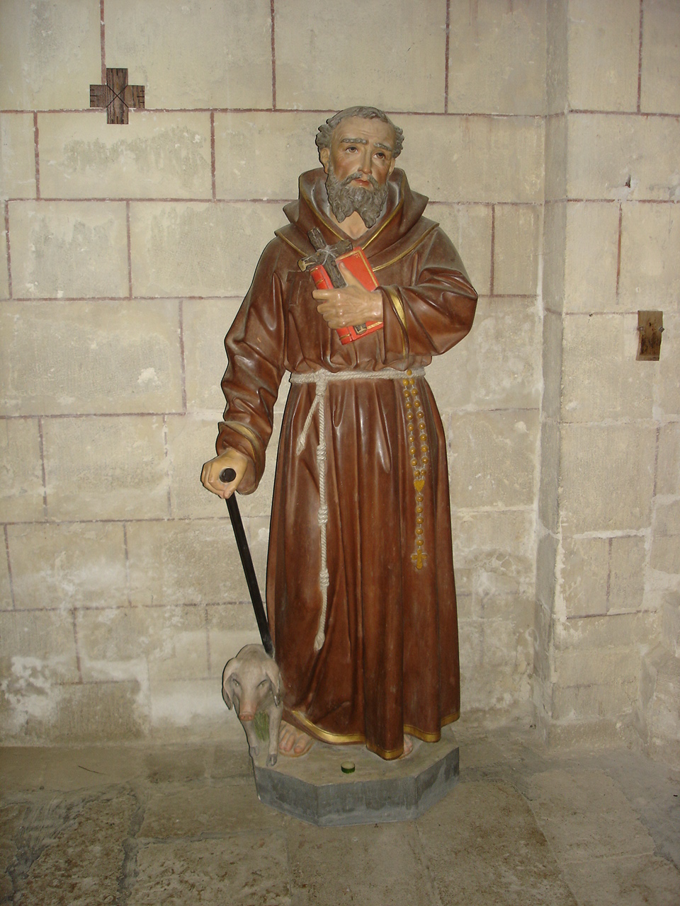 statue polychrome de saint Antoine (Uzeste 33 gironde France)